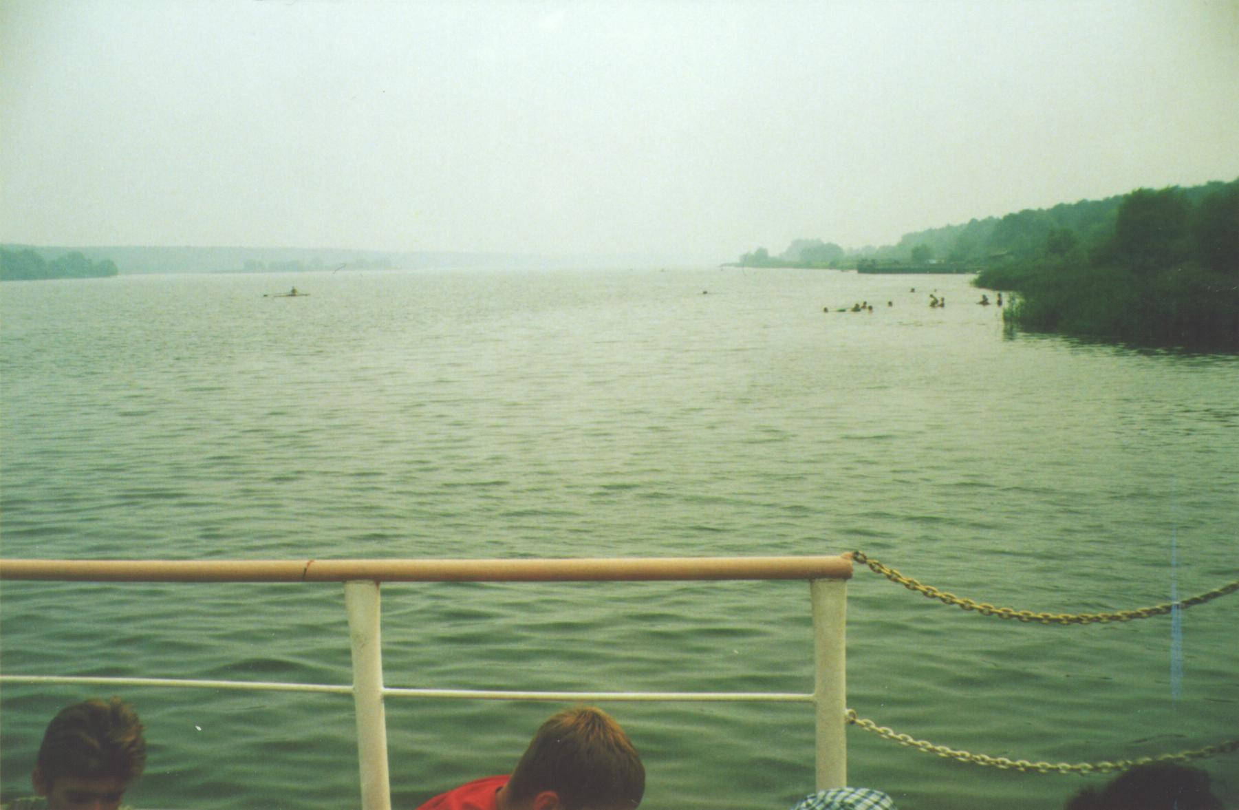 Rivero Volga je cxirkaux 40 km sube de urbo Tverj (2002).